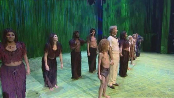 Peter de Kroon, Tarzan de musical